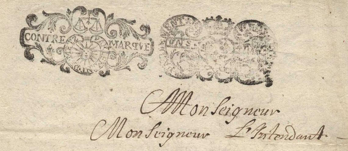 Contre marque du Parlement de_Metz (des Trois évêchés) et timbre fiscal (à droite) d'1 sol et 4 deniers sur un acte notarié de Carignan (Ardennes) en 1733. Archives personnelles.